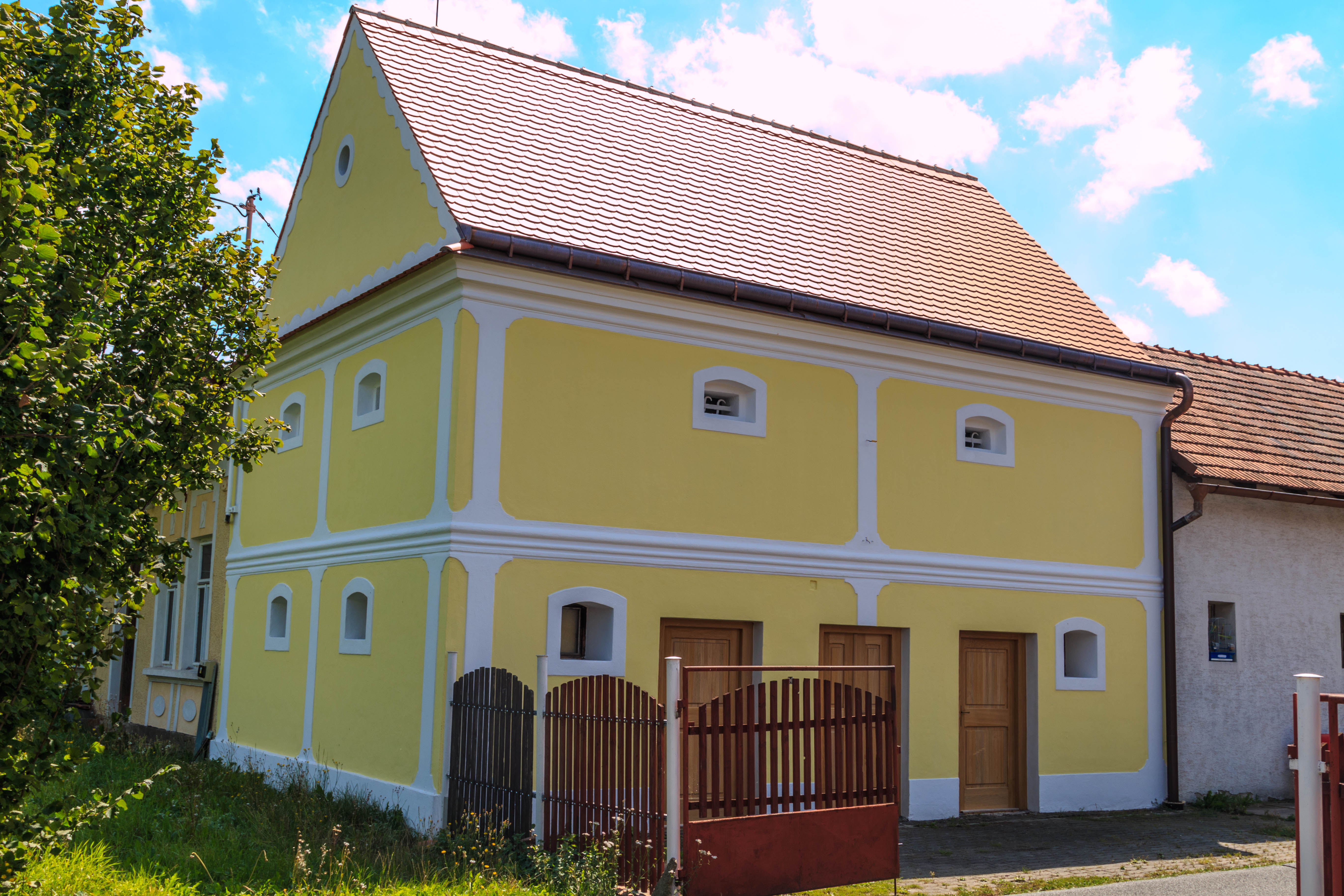 Sýpka u čp. 47, Ostřetín 47, Ostřetín.